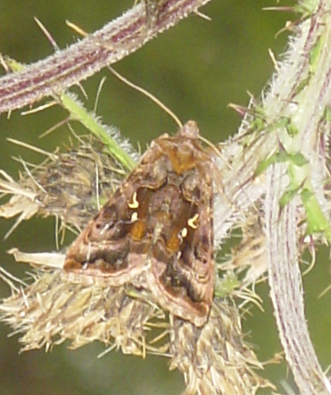 Autographa pulchrina (Plusiinae, Noctuidae, Lepidoptera)